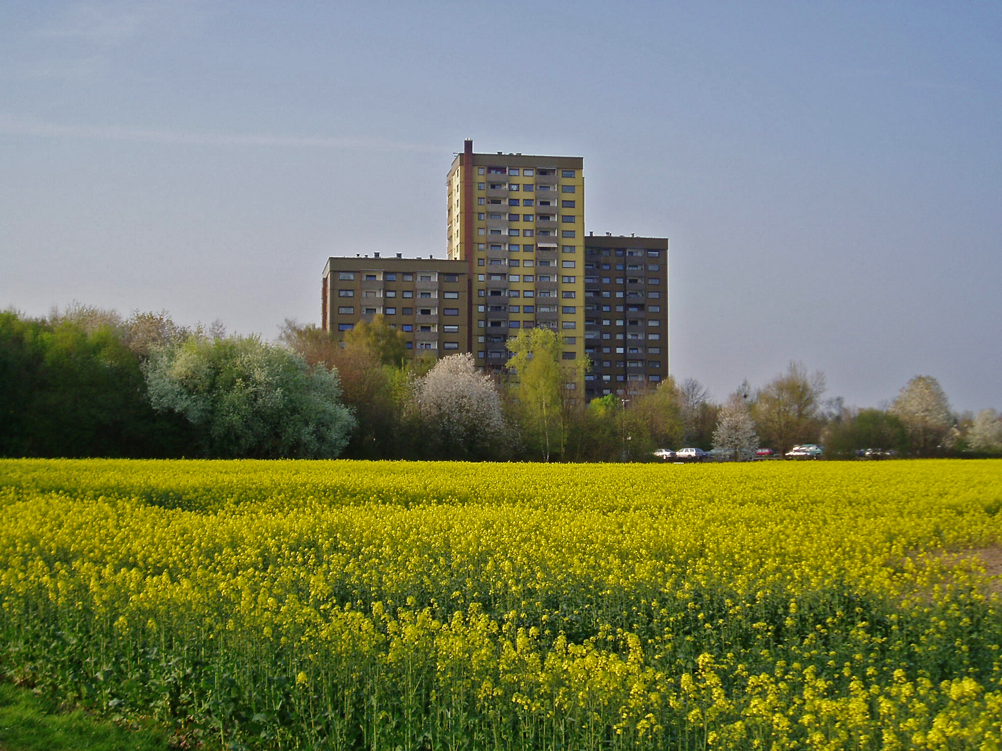 Köln-Brück - Hochhaus Hans-Schultenstr. mit Rapsfeld im Vordergrund